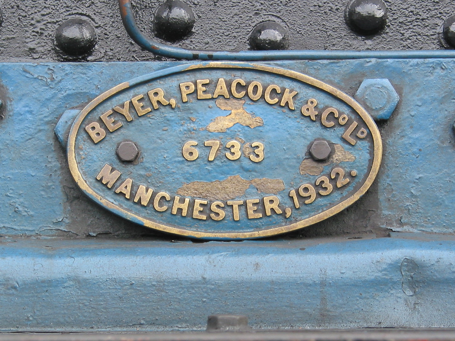 Great Northern Railway (Ireland) Nummer 85 Merlin (Reihe V) in Dublin im Inchicore Railway Works